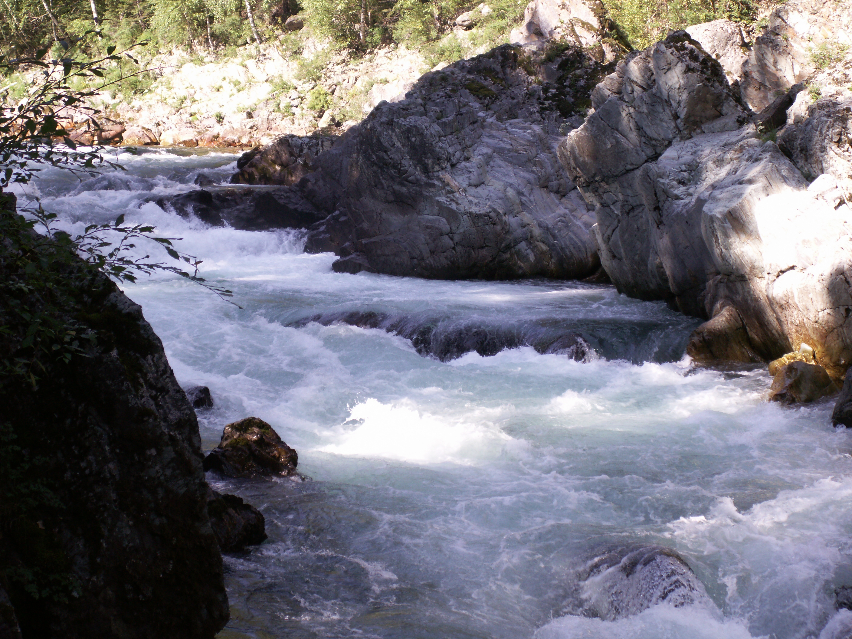 Река Кумир. Горный Алтай. Девичьи плёсы